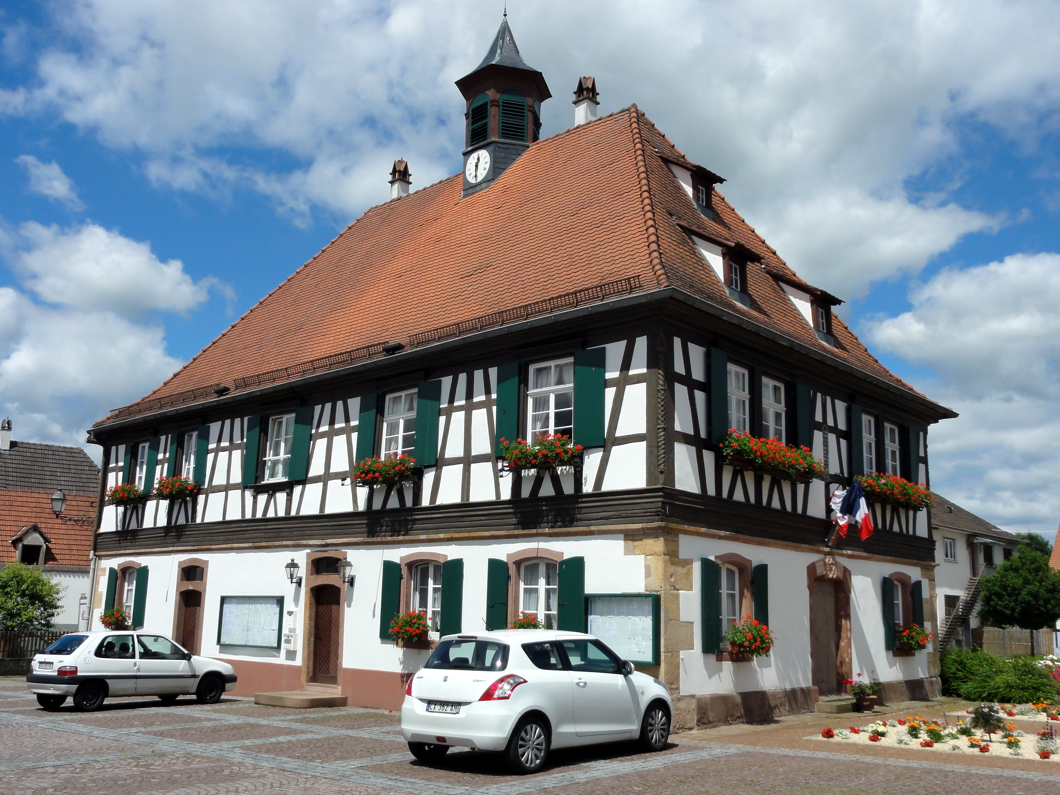 Alsace, Bas-Rhin, Seebach, Mairie (1731).